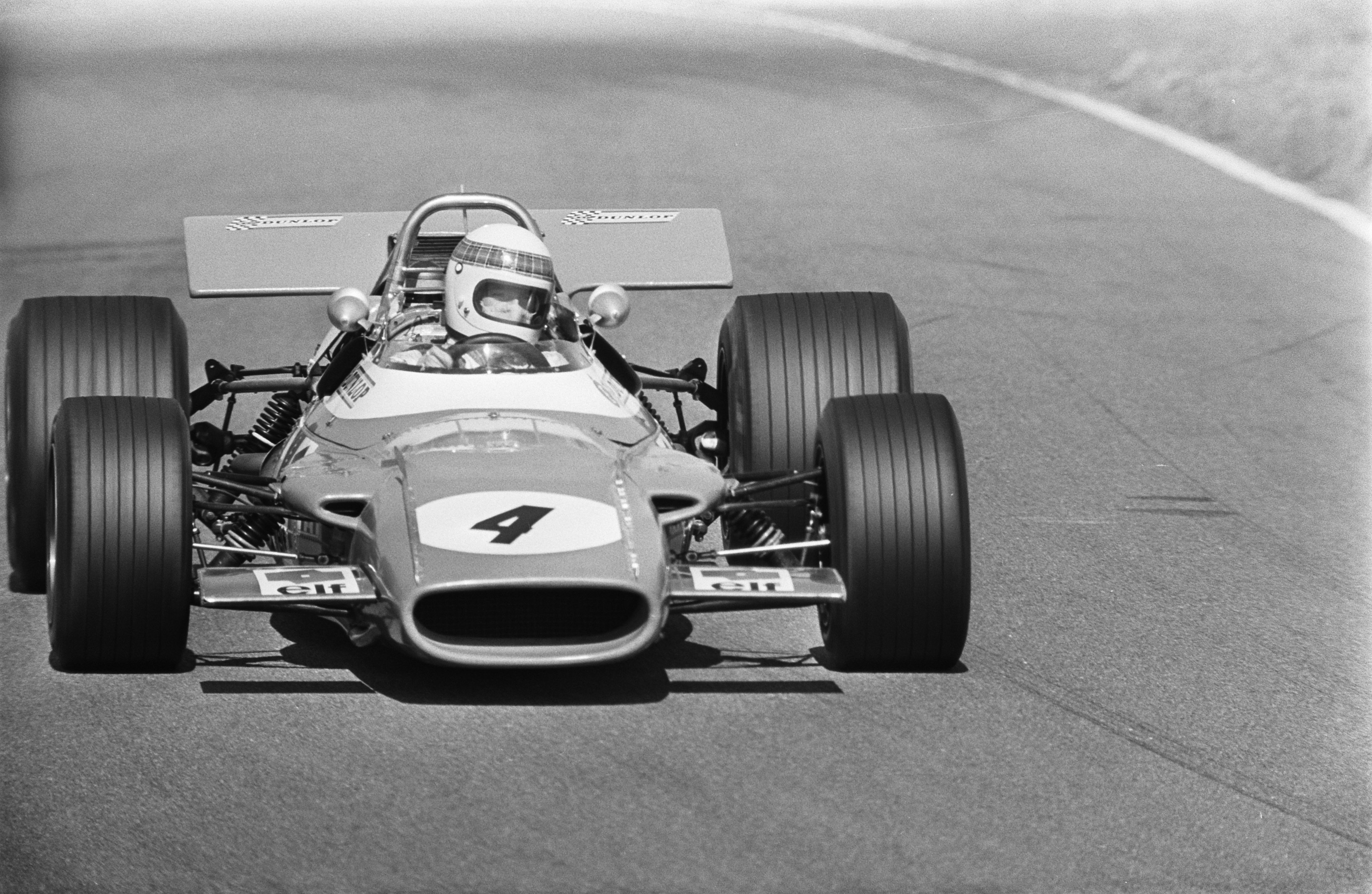 Jackie Stewart in een Cosworth Matra MS 80 in actie.